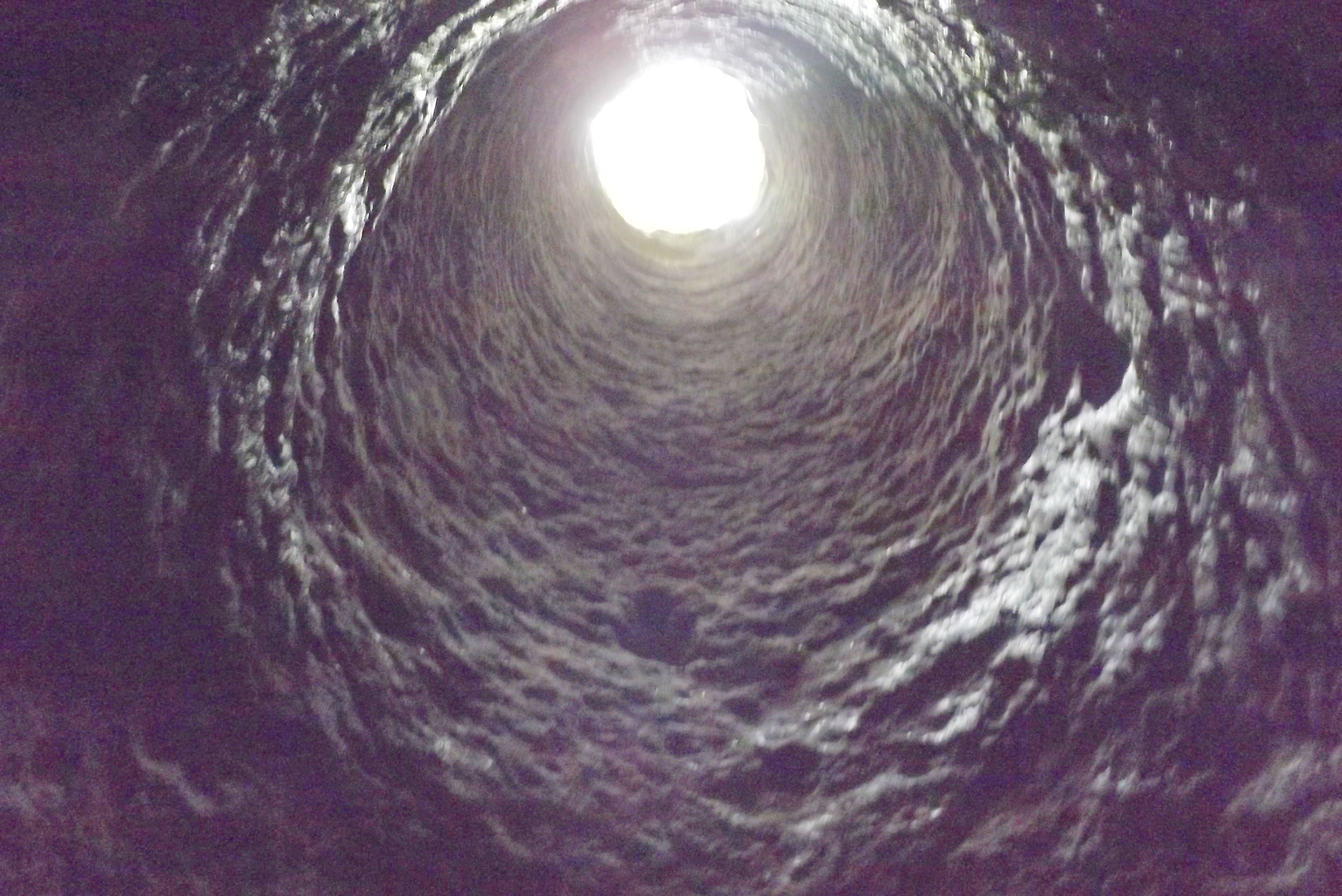 A Léleklyuk-barlang kürtője